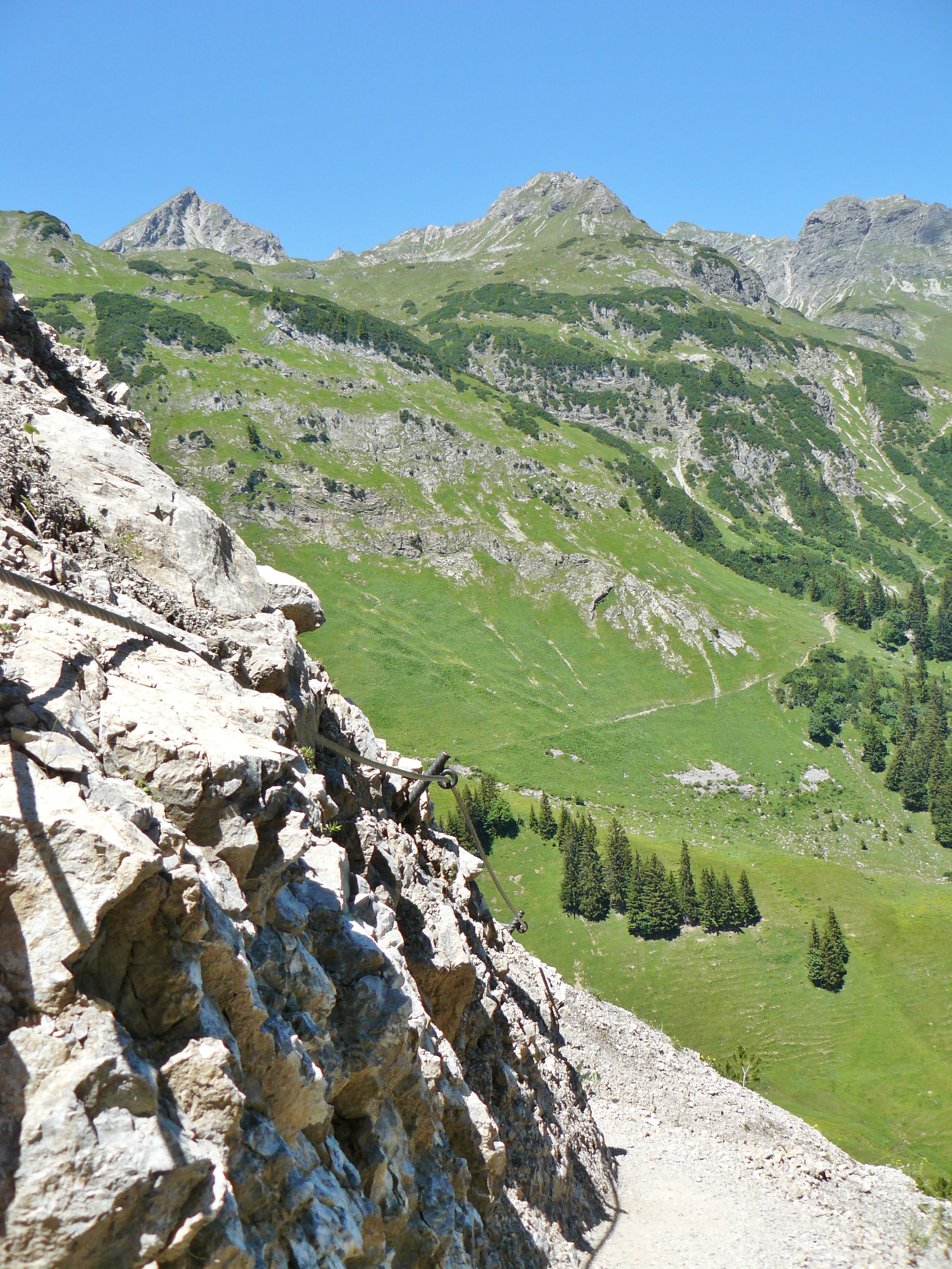 Schrofenpass